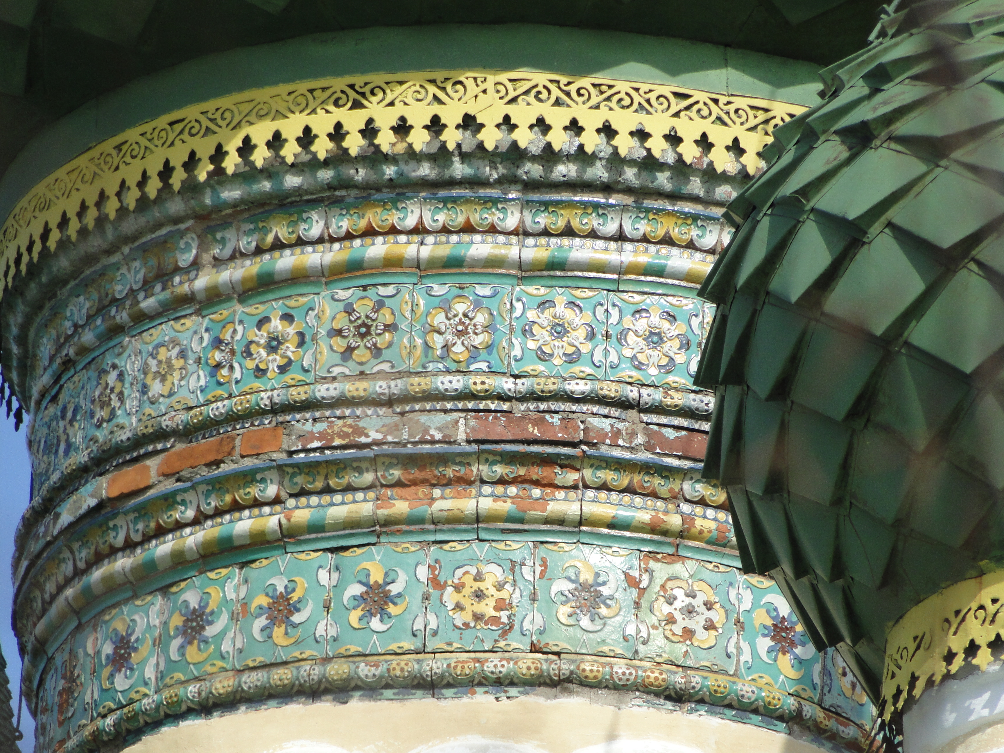 Украшение барабана Церкви Рождества Иоанна Предтечи (Углич, Россия)